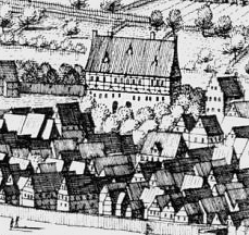 Bodenwerder